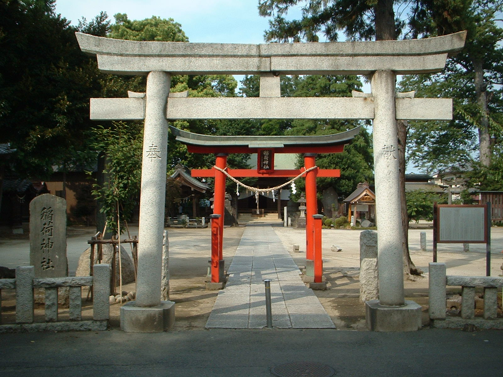 桶川稲荷神社の入口